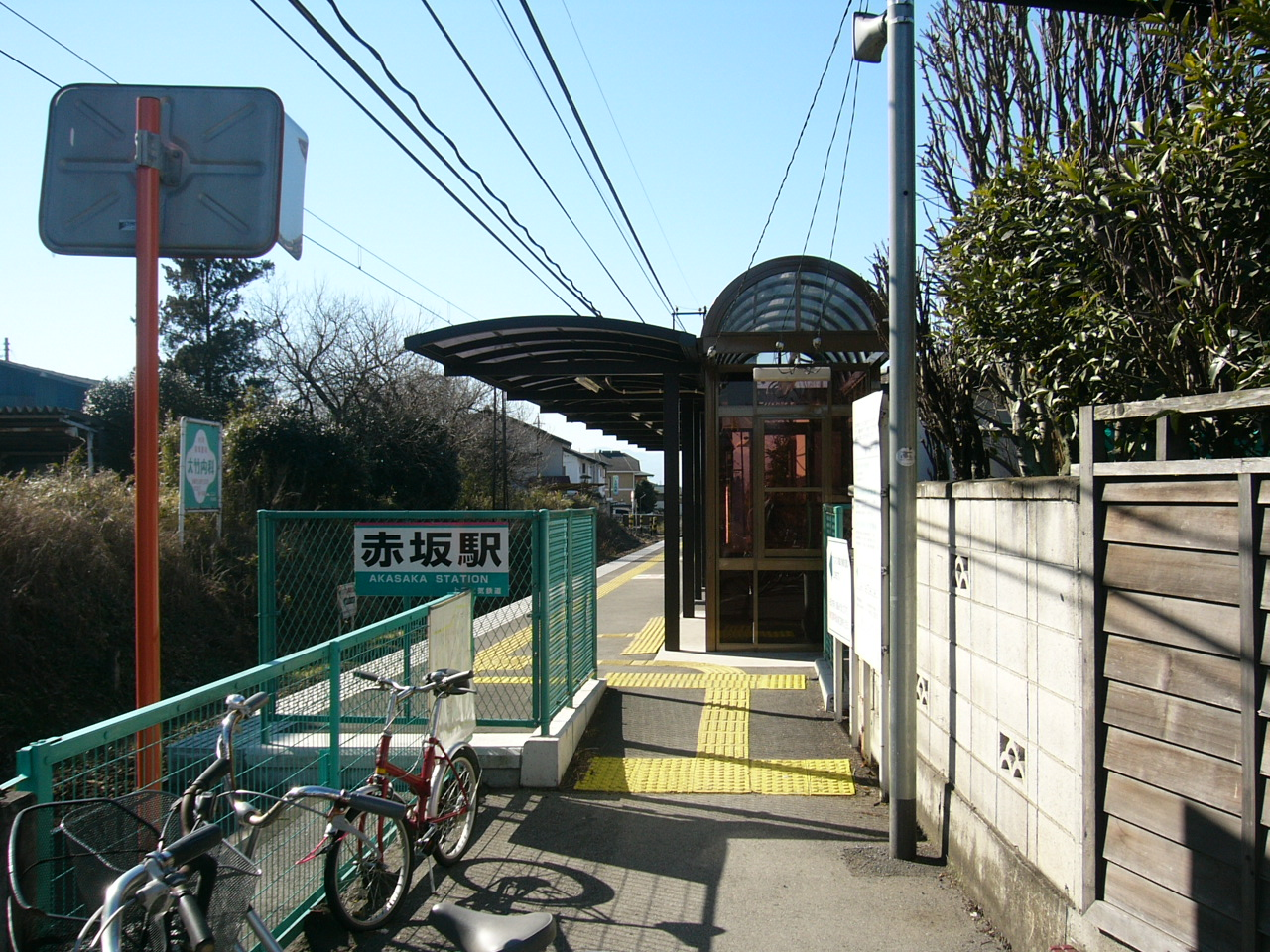 Akasaka Station